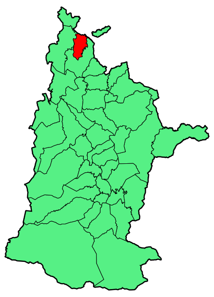 Aipaturiko udalerriaren kokapena Zuberoan